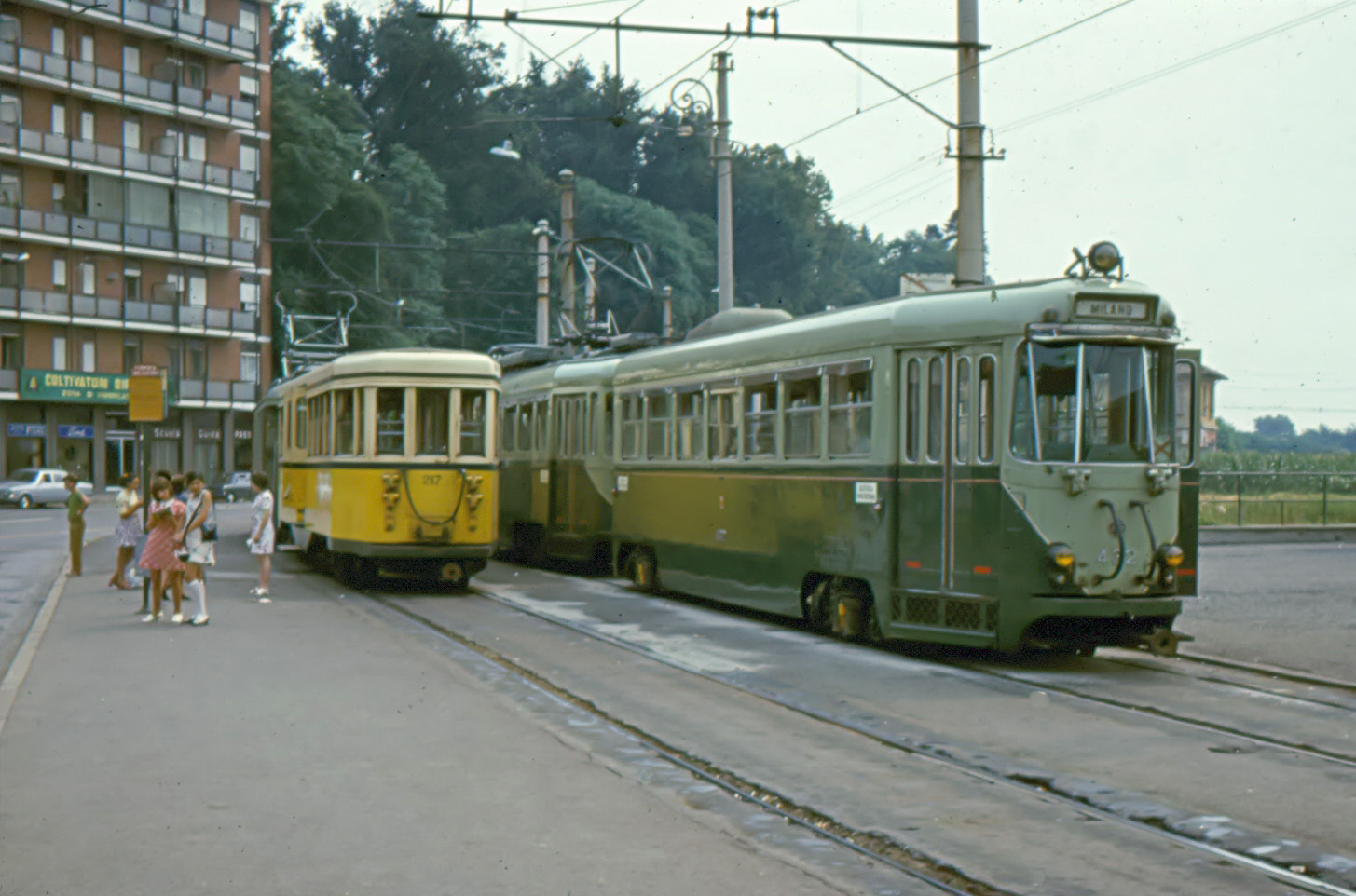 Il capolinea di Vimercate della tranvia per Milano. Sul binario di sinistra è in sosta un treno di materiale ordinario, sul binario di destra un treno bloccato serie 400